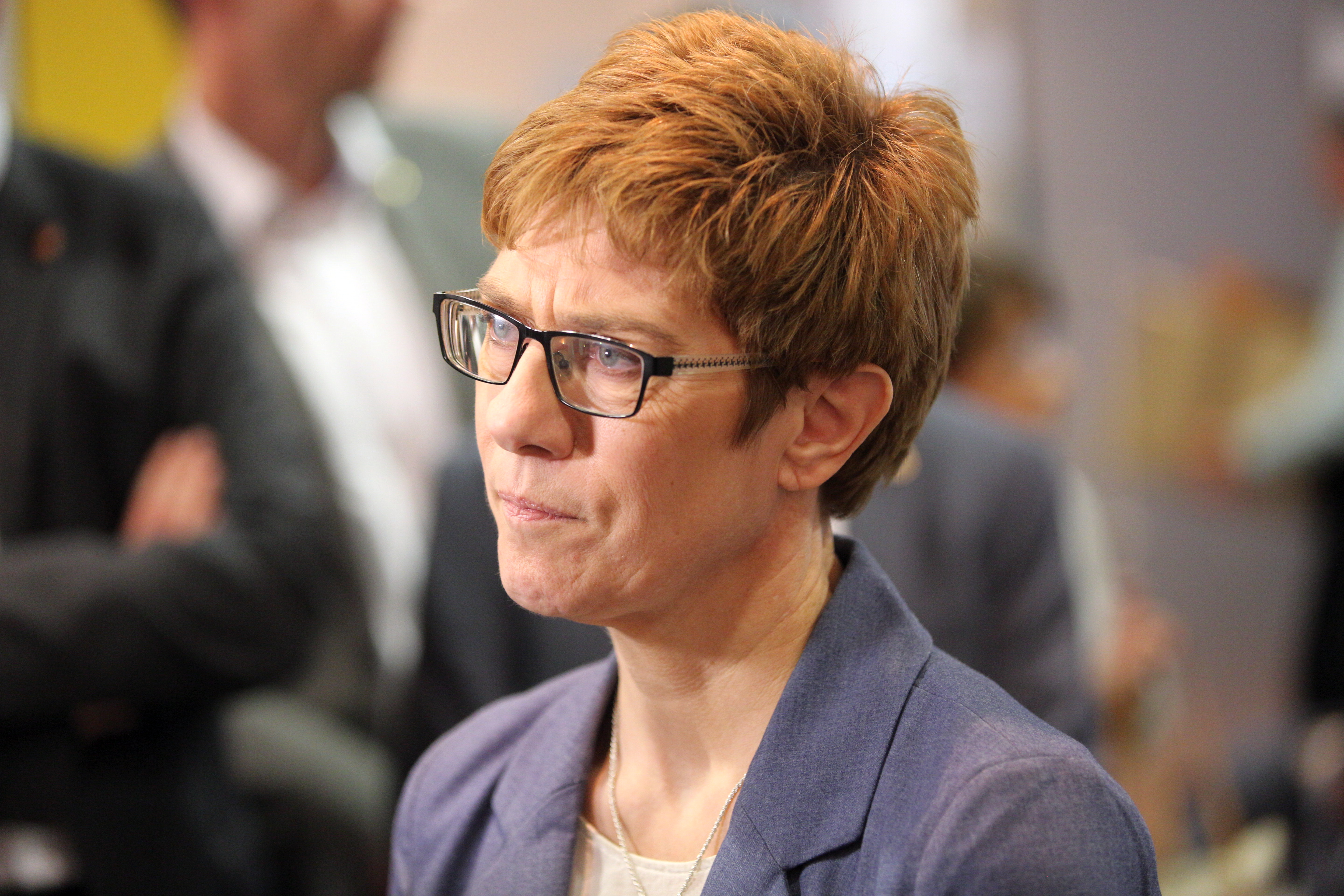 Ministerpräsidentin Annegret Kramp-Karrenbauer (CDU) beim Wahlabend zur Landtagswahl im Saarland